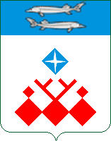 Герб Жиганского Эвенкийского национального наслега, Республика Саха (Якутия)